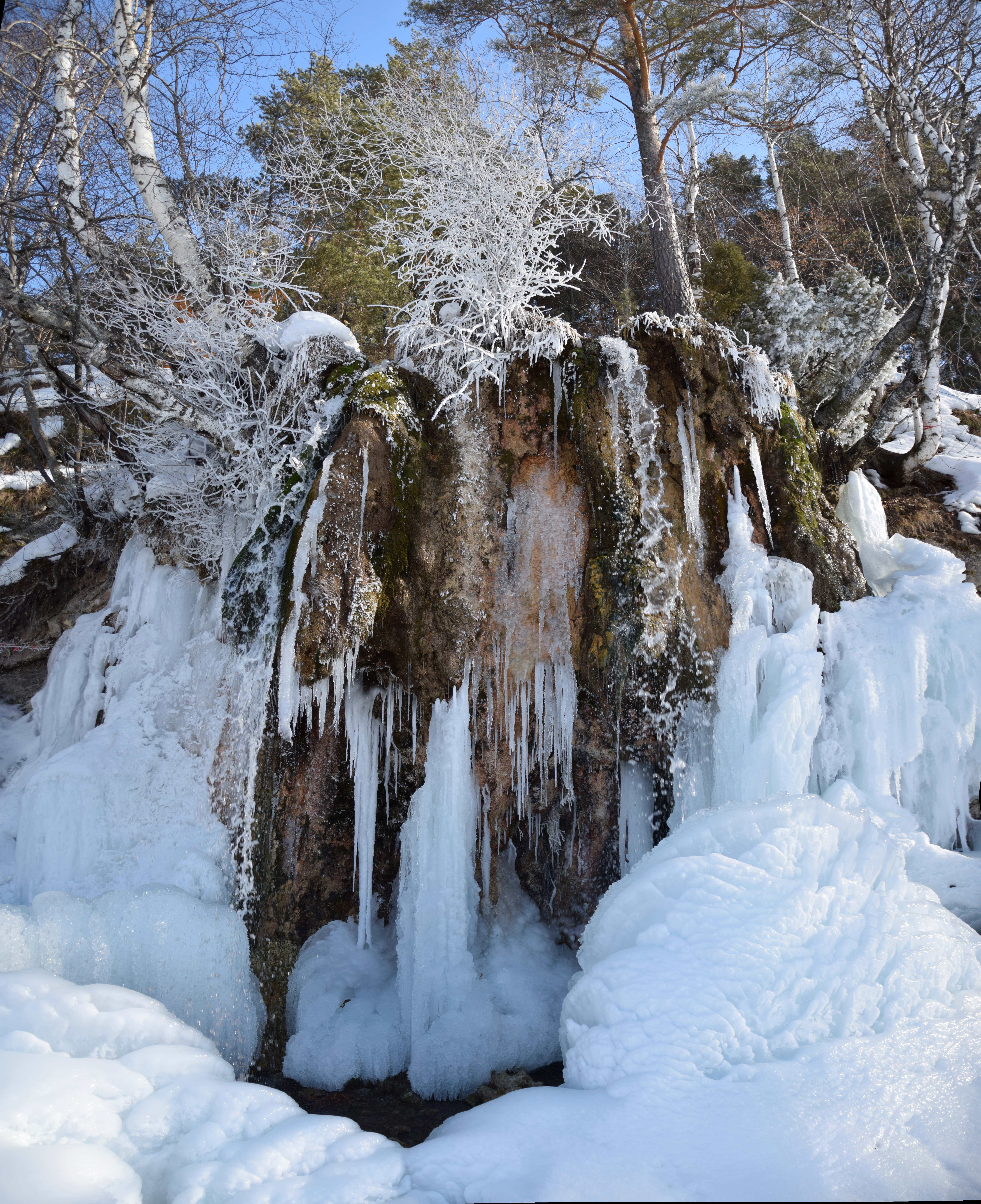 Плакун, Суксунский район This image is related to the protected area of Russia number 5910364